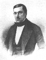 Калачов Николай Васильевич (1819—1885) — русский юрист, историк, археограф, архивист, писатель, профессор истории русского права, член-корреспондент Санкт-Петербурской академии наук (1858), сенатор, издатель журнала «Юридический вестник (СПб)»